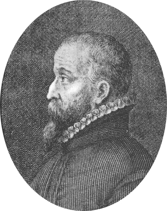 Sujet : Portrait de Camerarius le Jeune Source : Engraving by Bartholomaeus Kilian, probably between 1650 and 1700 (Department of prints and drawings, British Museum) Artiste : Bartholomaeus Kilian